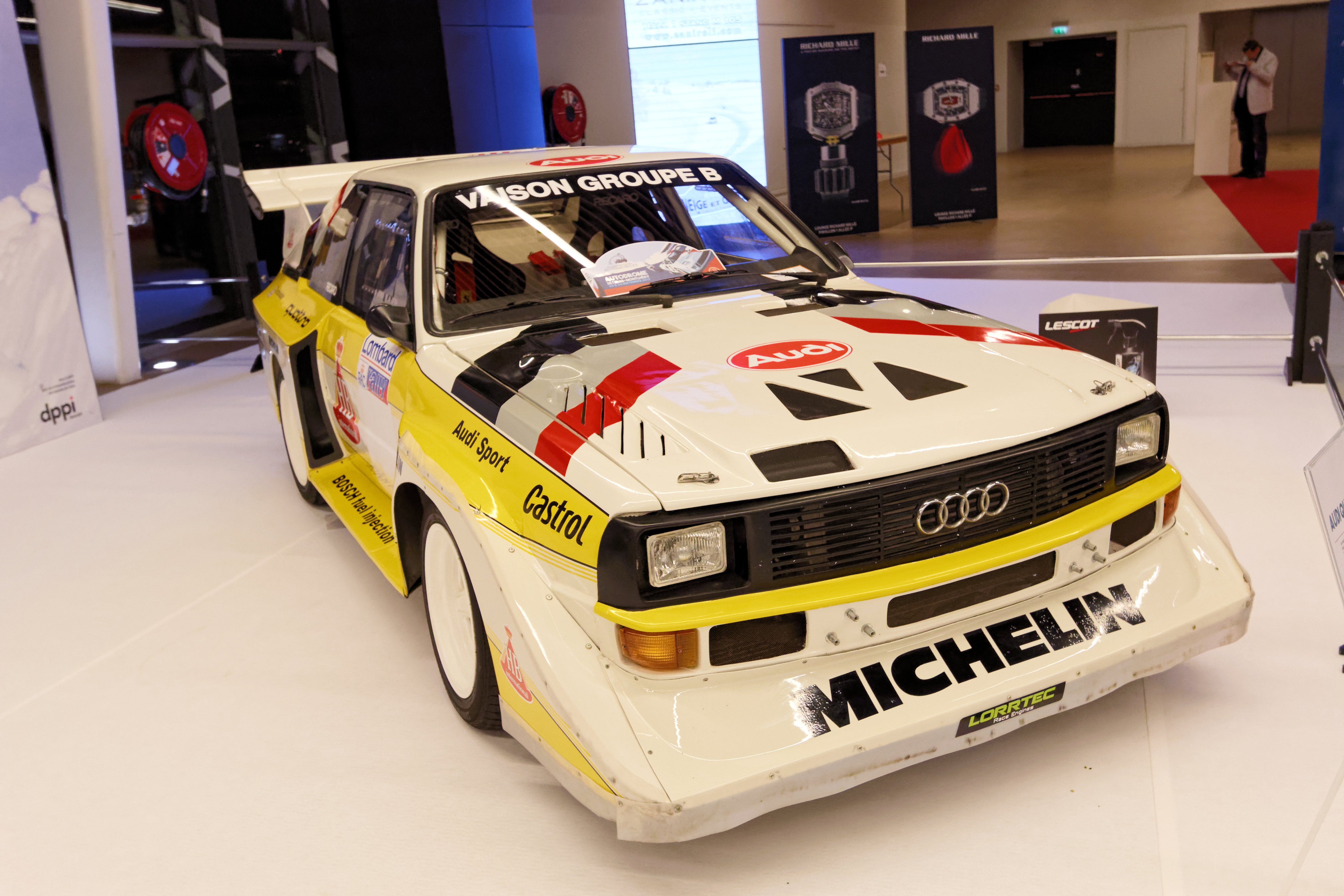 Une Audi Quattro S1 replica de 1985 exposée lors du salon Rétromobile 2017.